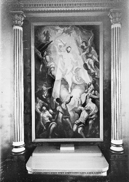 Altartavla, av Gunnar Erik Ström. Kategori: (05) Altarprydnader, detaljer Altartavla, av Gunnar Erik Ström.